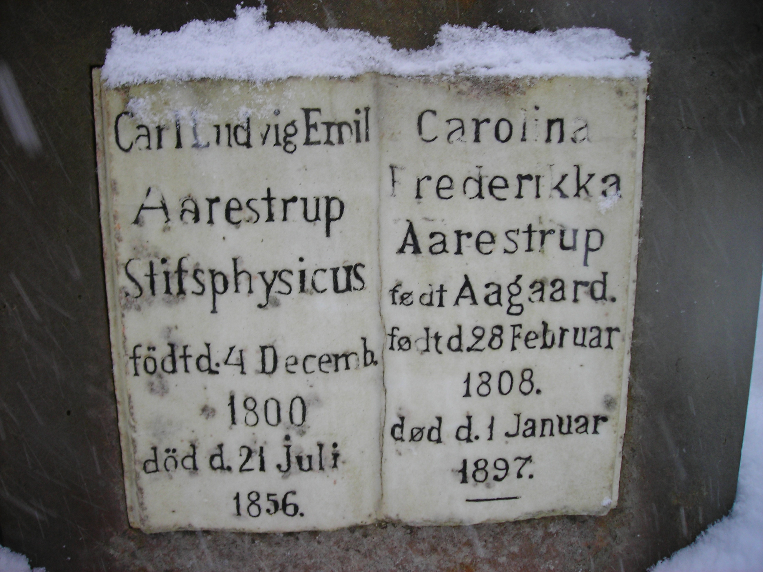 Emil Aarestrups gravsten på Assistens Kirkegård i Odense